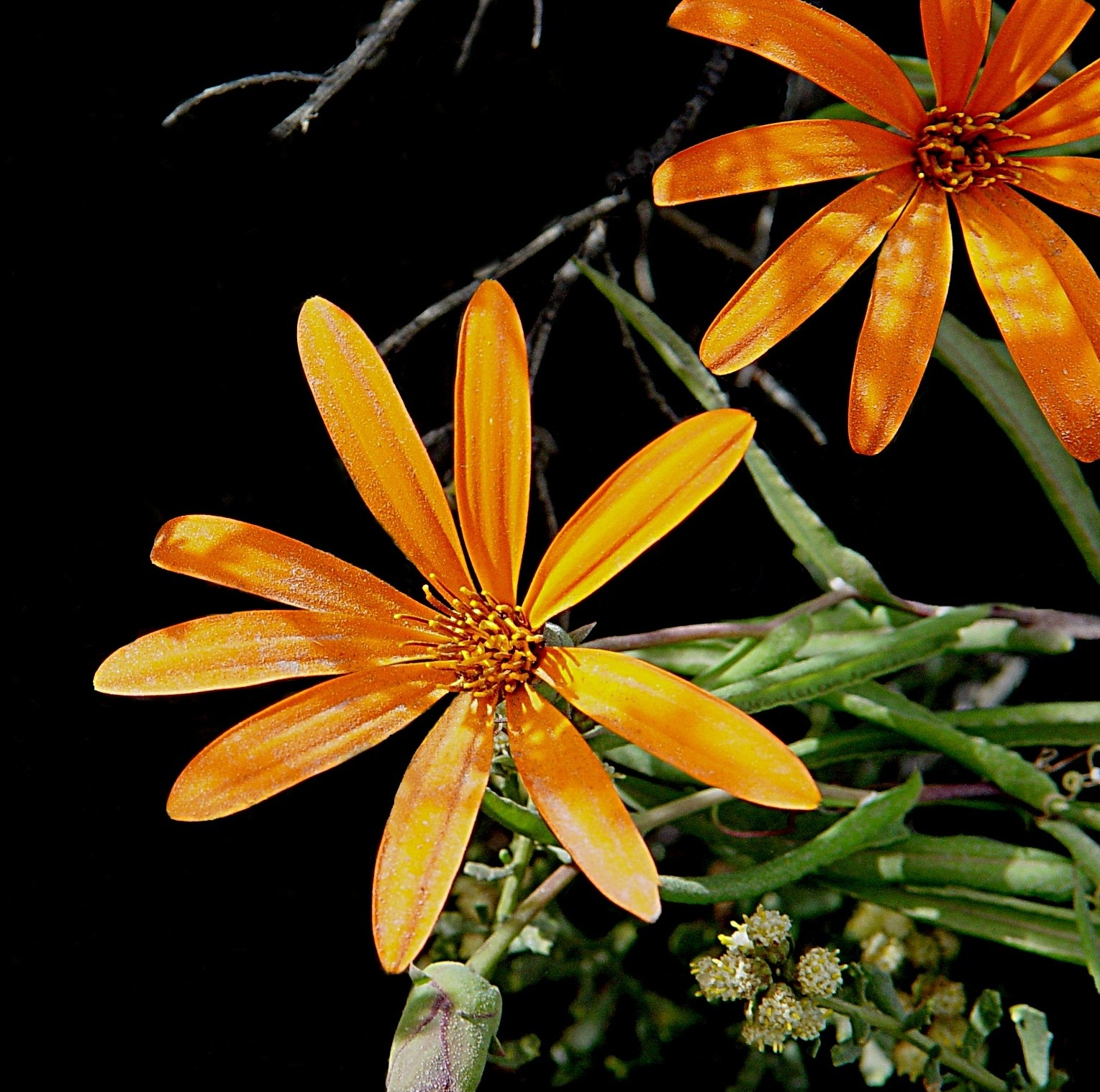 Mutisia, flor provincial de Neuquen, Argentina.